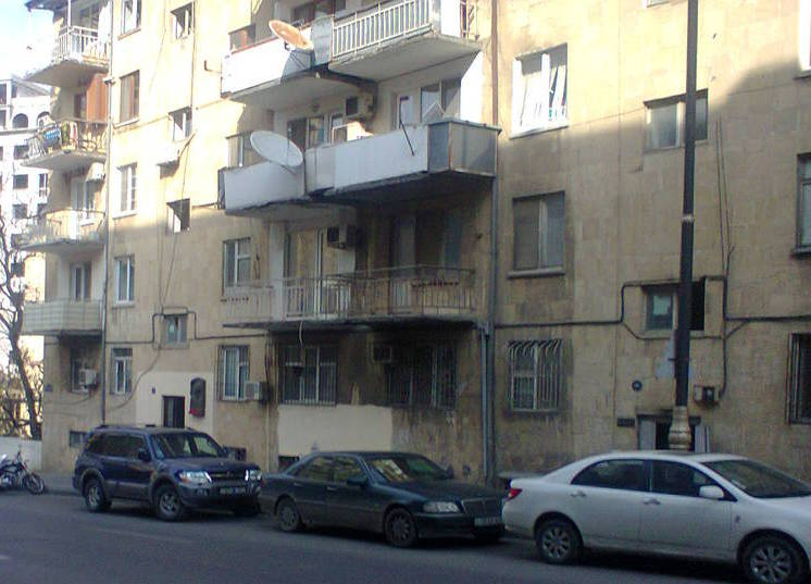 В этом доме жил Ислам Сафарли (при более детальном рассмотрении можно даже увидеть памятную доску)